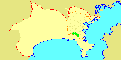 Map of Sakae-ku, Yokohama, Kanagawa-prefecture, Japan